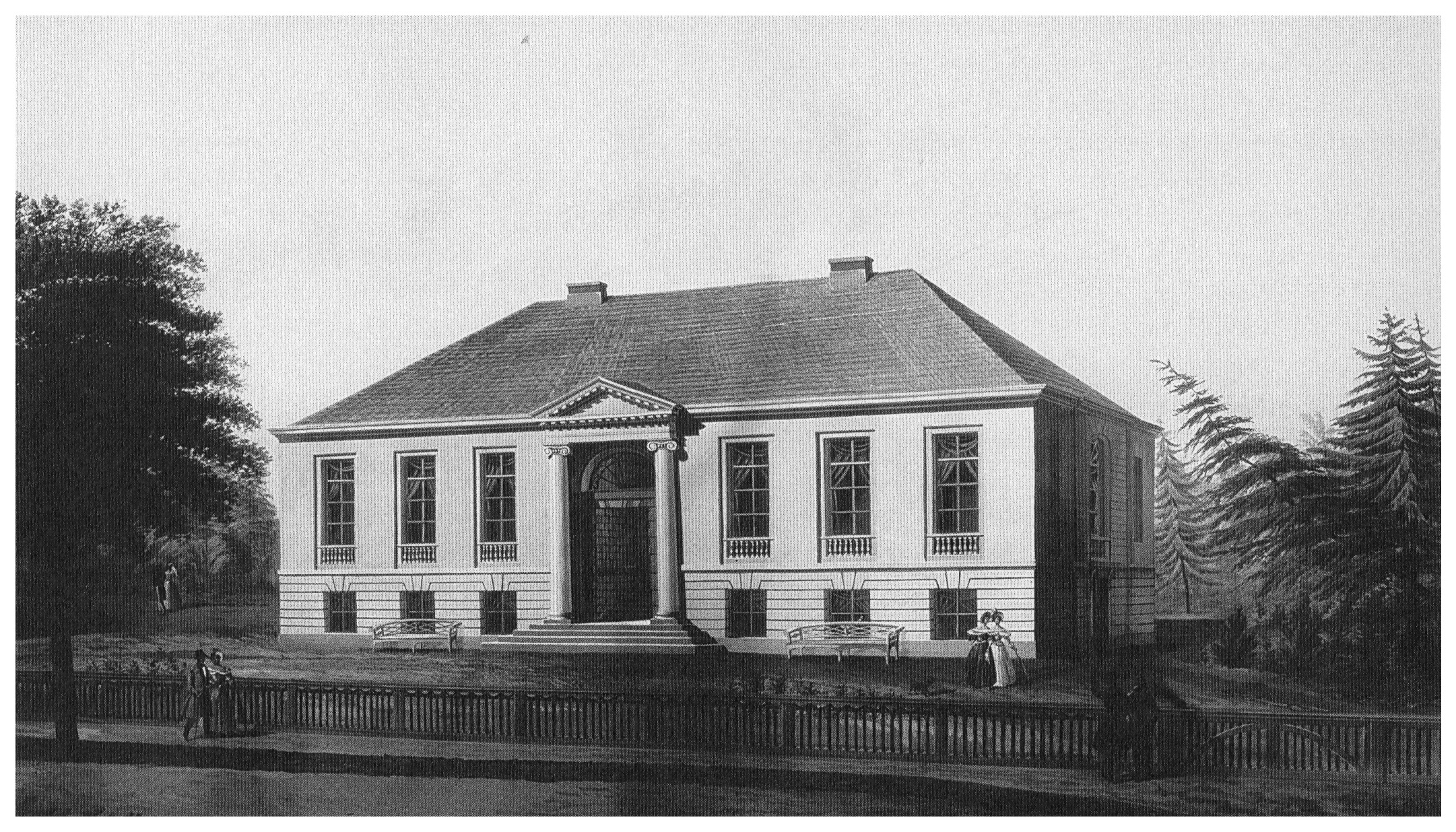 Johann Baptist Hauttmann: Gouache der Lindeschen Villa in Lübeck im Jahr der Erbauung 1804 mit Hinweis "Lillie architectus extruxit 1804".